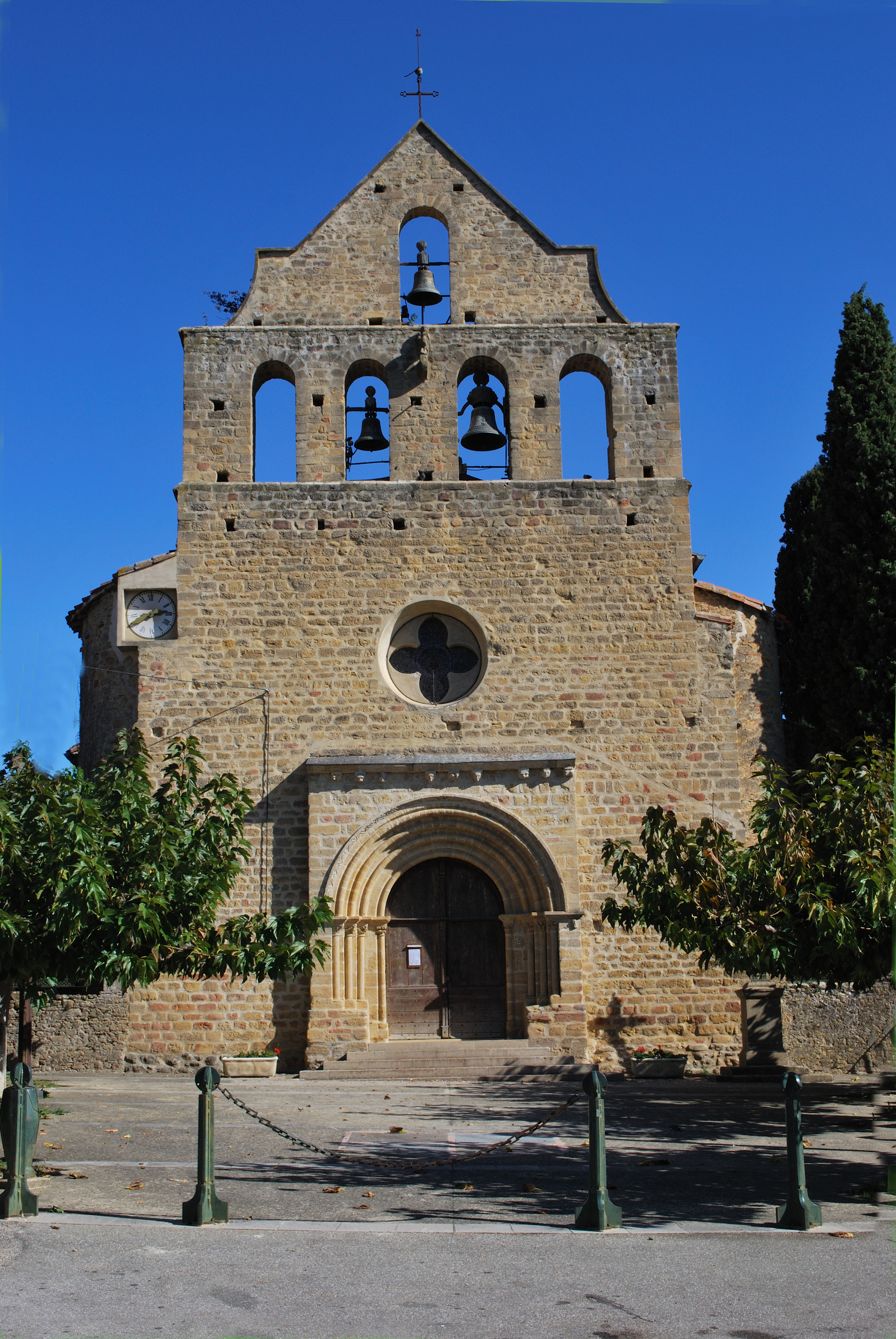 Façade avec son clocher peigne du 14e siècle. Le portail est surmontée d'une haute muraille réalisée aprés la guerre des Albigeois